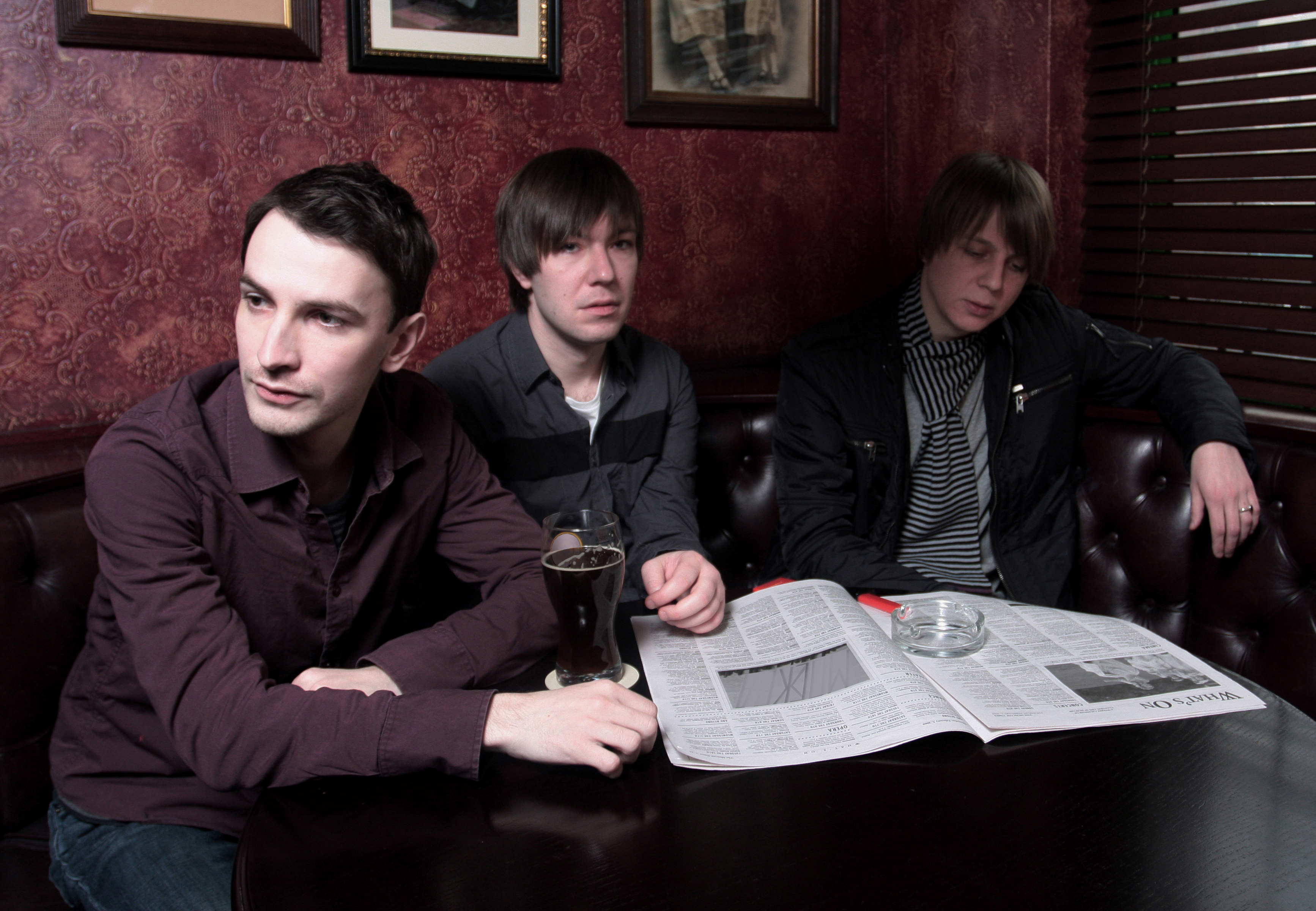 Промо фотография Punk TV к альбому Loverdrive.